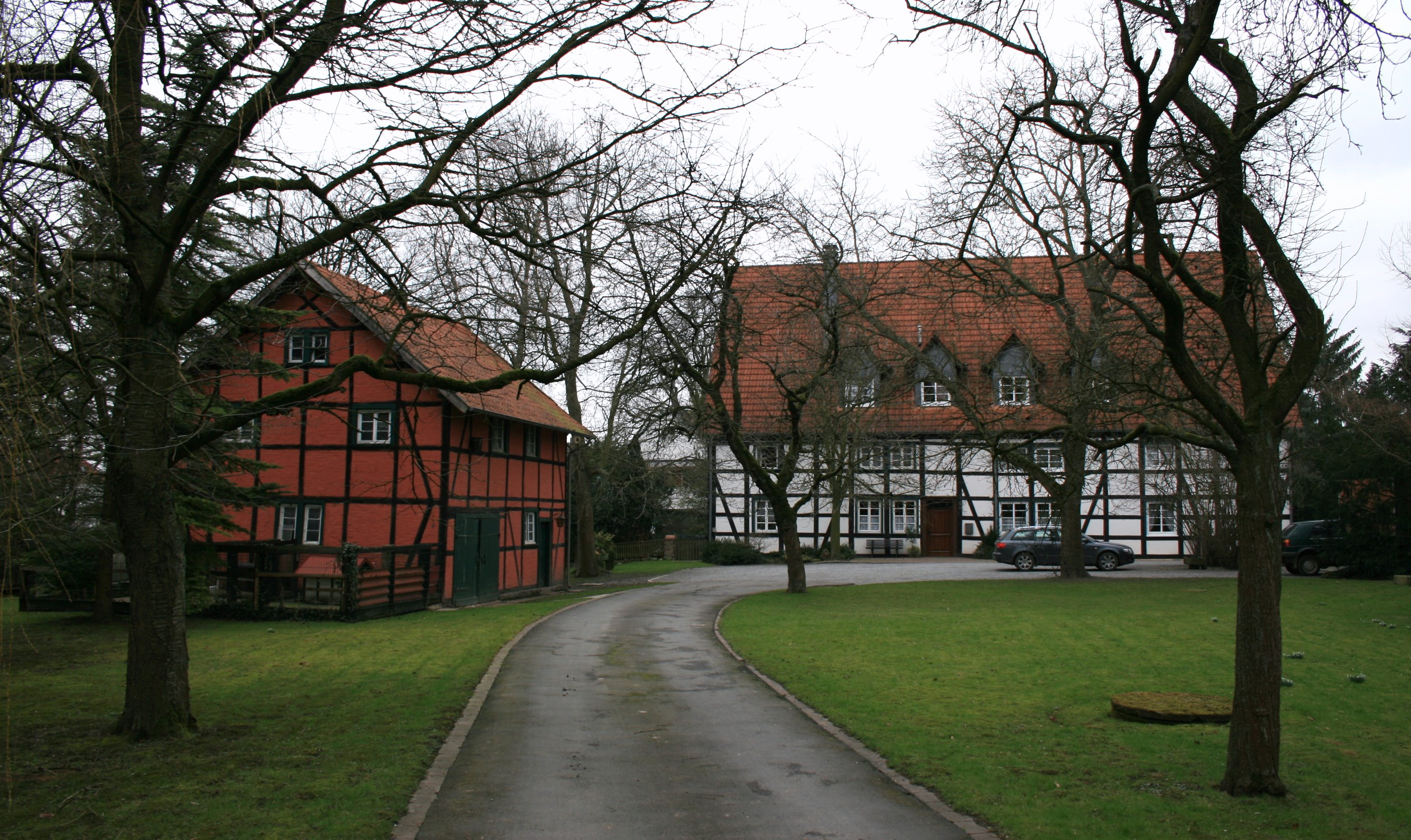 Fachwerkhäuser im Ortsteil Schwitten der Stadt Menden (Sauerland), Schwitter Dorfstraße 10. This image shows a heritage building in Germany, located in the North Rhine-Westphalian city Menden (Sauerland) (no. 52).